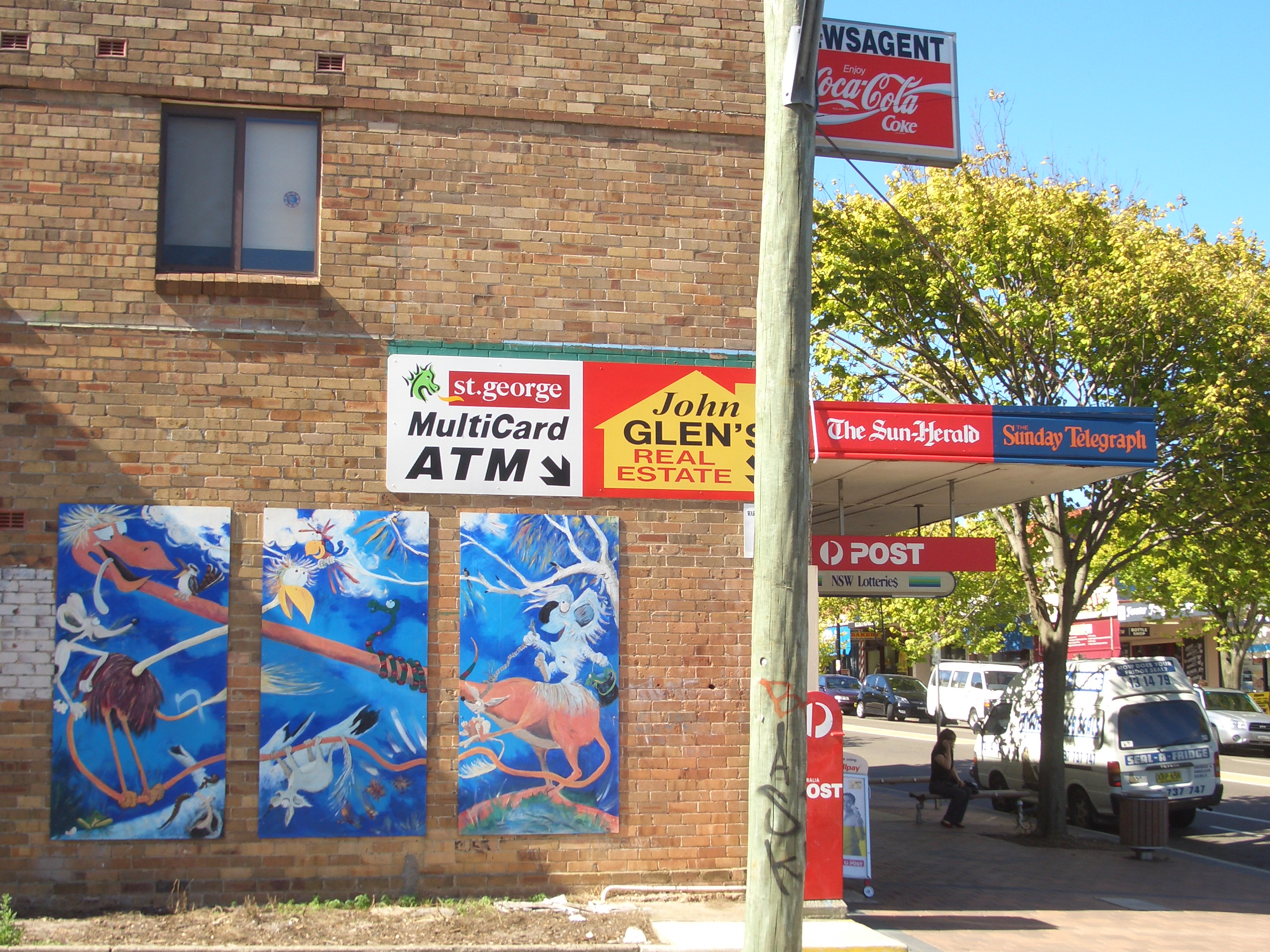 Oak Road, Kirrawee